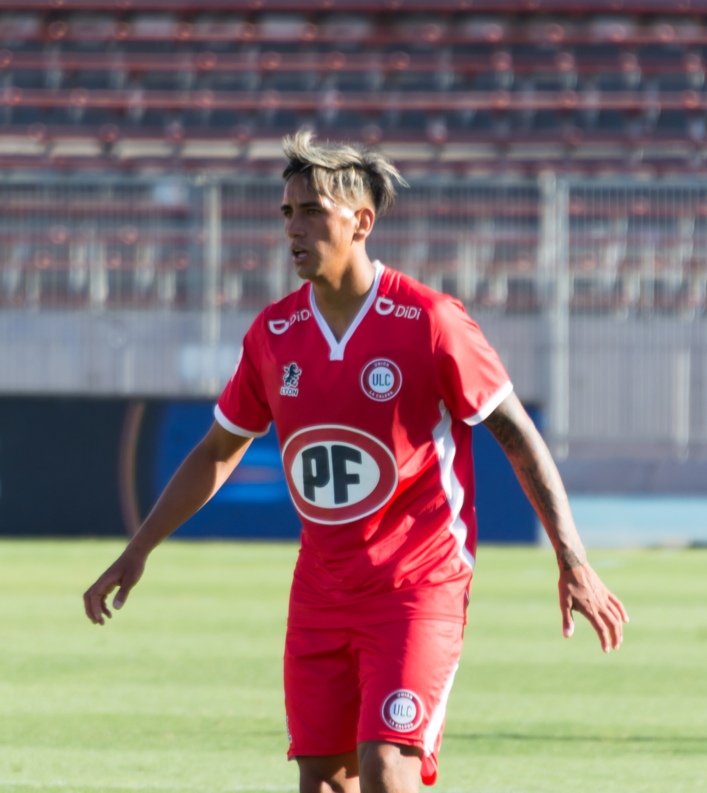 Universidad de Chile v Unión La Calera, Estadio Nacional, Ñuñoa, Santiago, Región Metropolitana, Chile